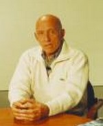 José Giovanni, écrivain et cinéaste français.